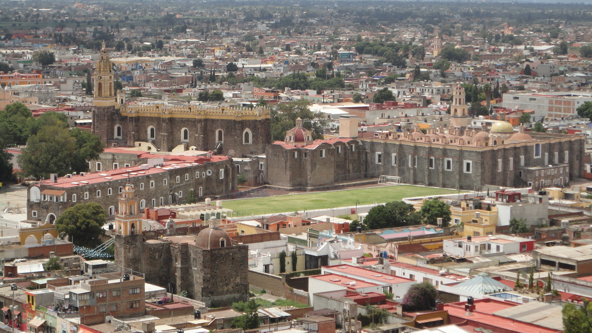 Vista del complejo desde la Pirámide de Cholula